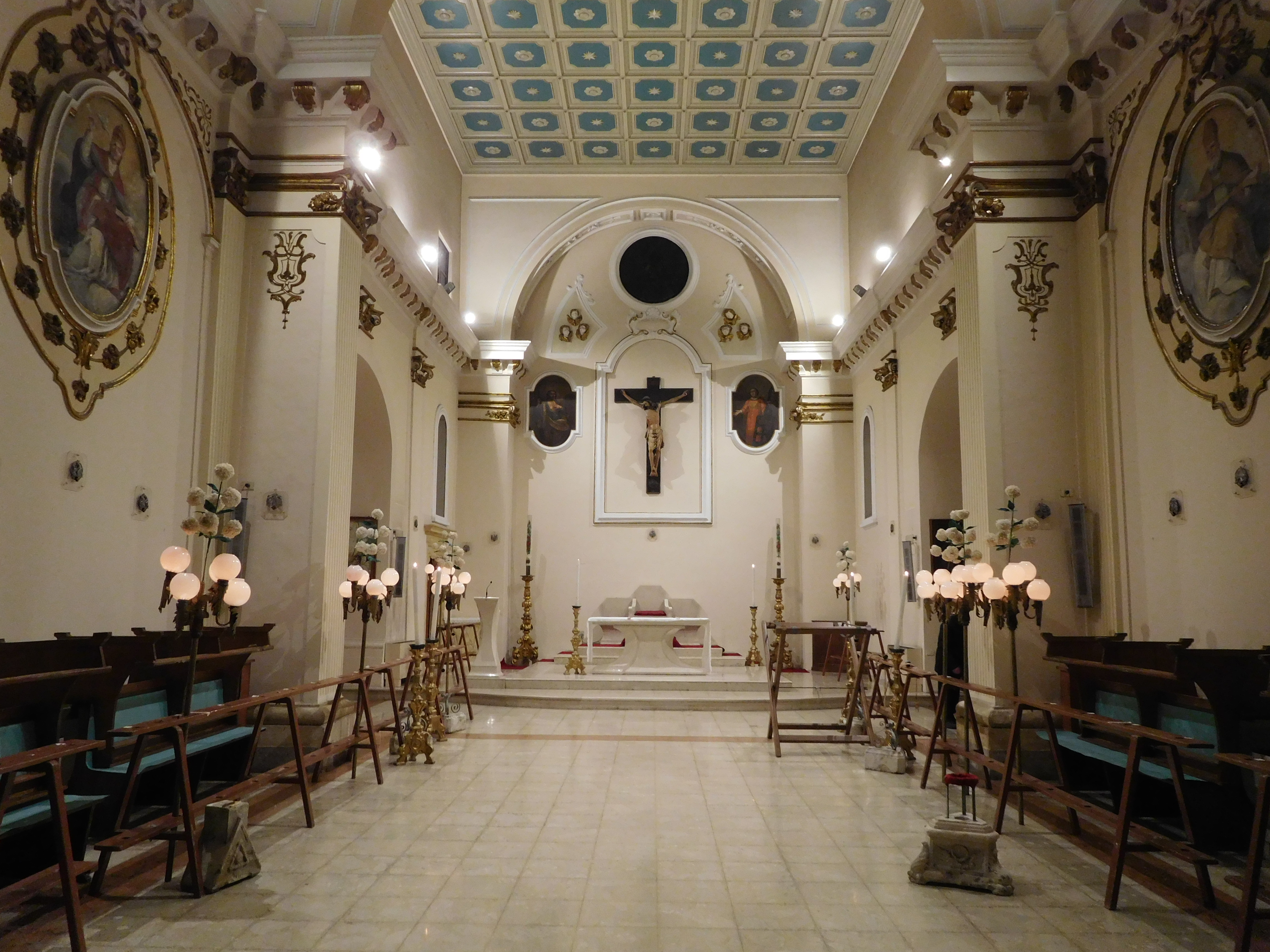 Chiesa della Santissima Trinità, Sulmona